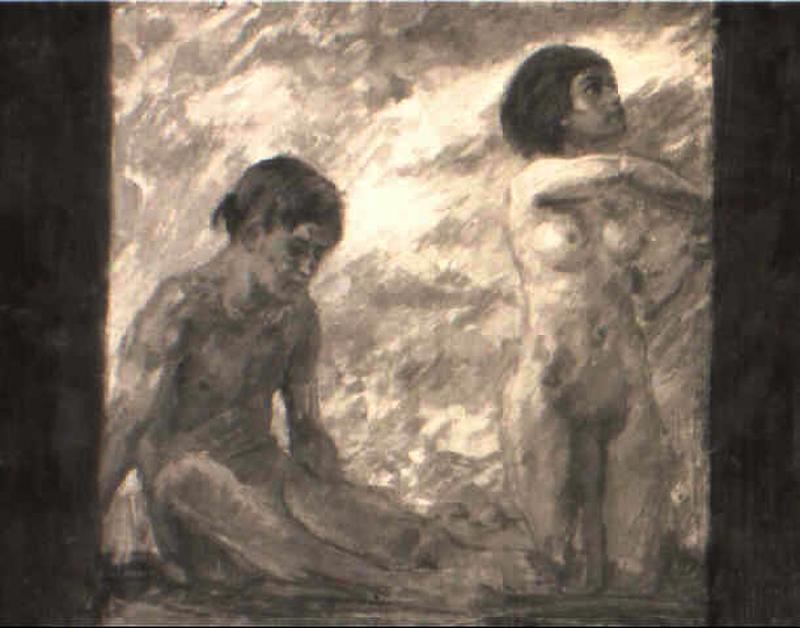 Morgen